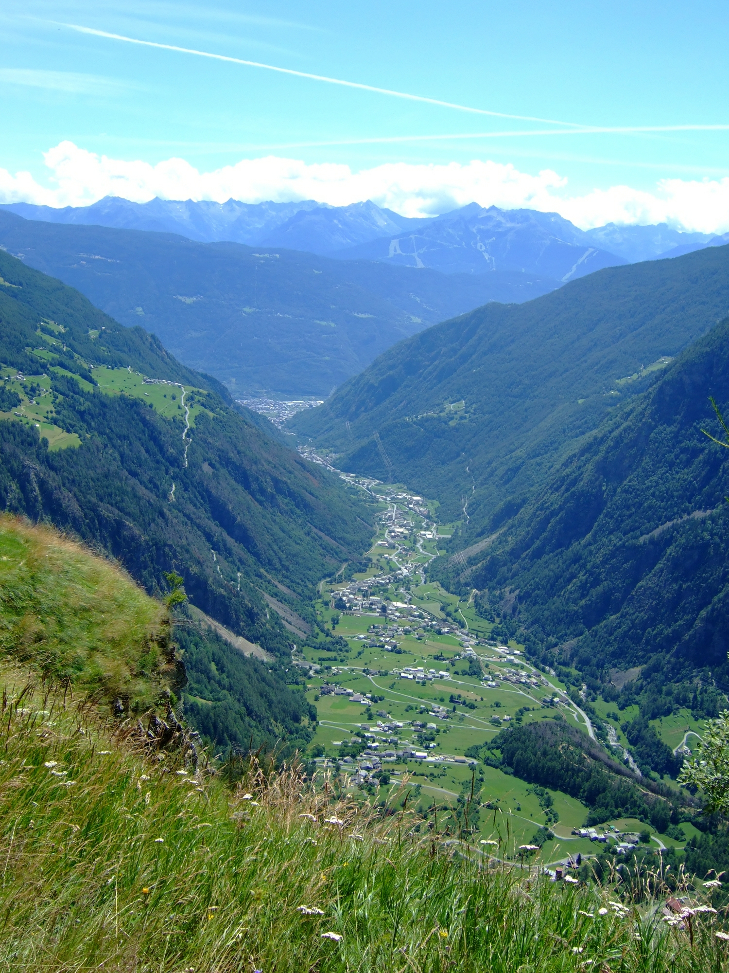 Sicht auf Brusio und Tirano von San Romerio, Schweiz